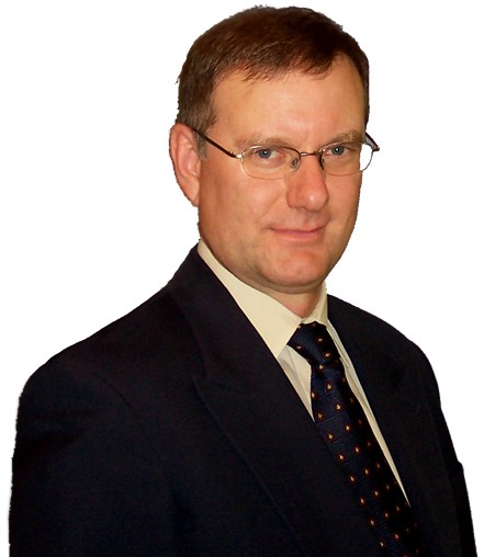 Image publique de Jean-Claude St-André, député de l'Assomption. Auteur: Paolo Zambito, attaché politique de Jean-Claude St-André (moi) Appareil digital Kodak no de photo 000_0149 (en développement) Licence publique, permis d'utiliser, de copier et de distribuer. Merci.